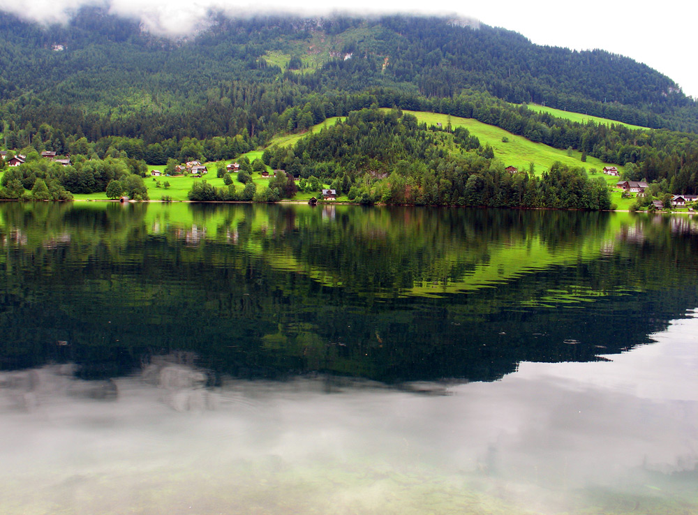 ein See in der Steiermark - un lac en Styrie, Autriche - oзеро в Штирии - a lake in Styria photo / foto von / de / by Roobit - 2006 (Eugene Soukharnikov, )